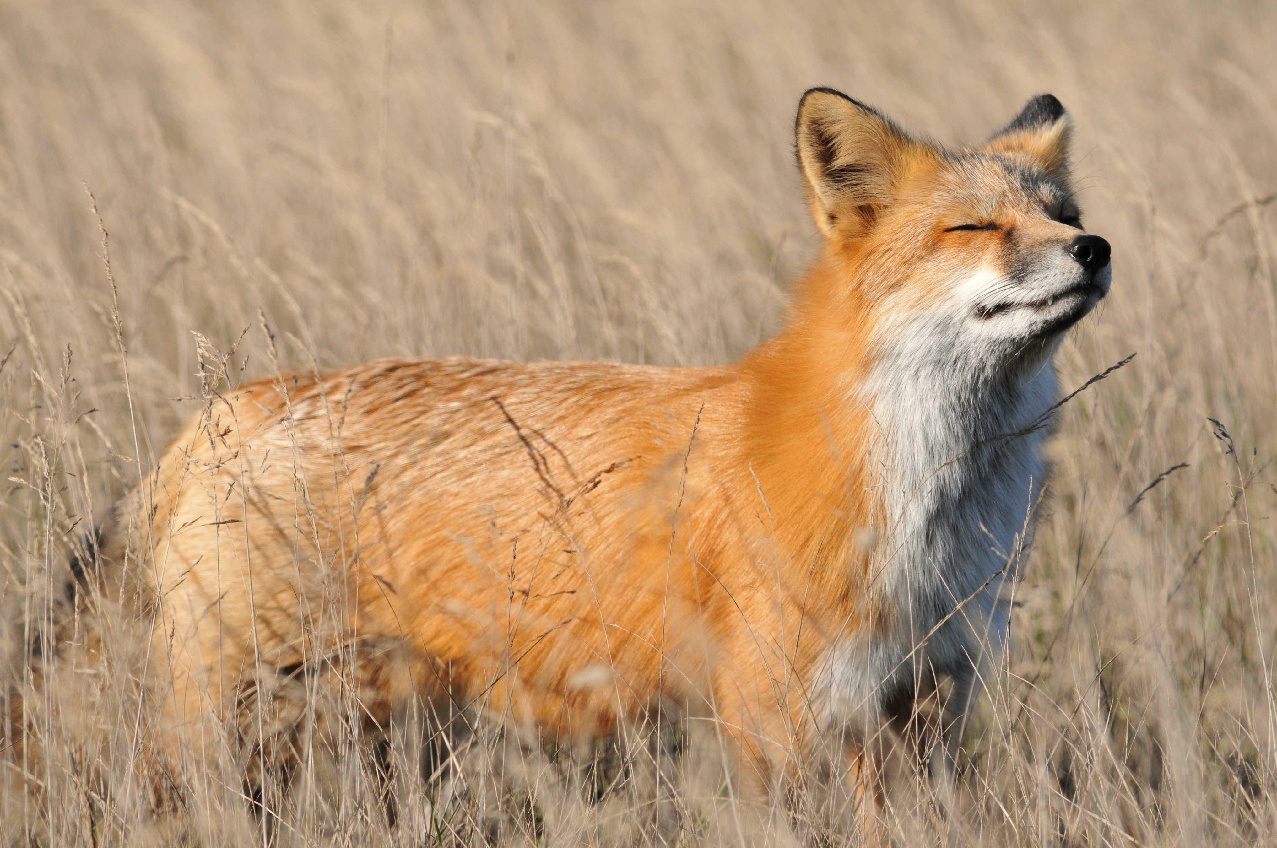 Renard roux fermant les yeux et humant l'air